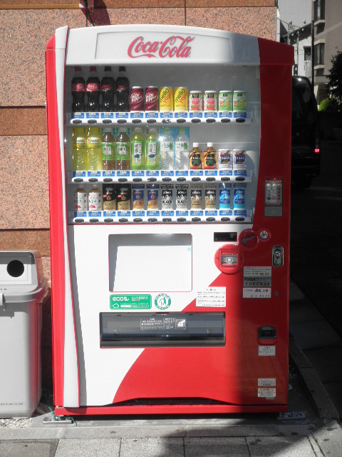 マルチマネー対応自販機 ｢3D VIS｣